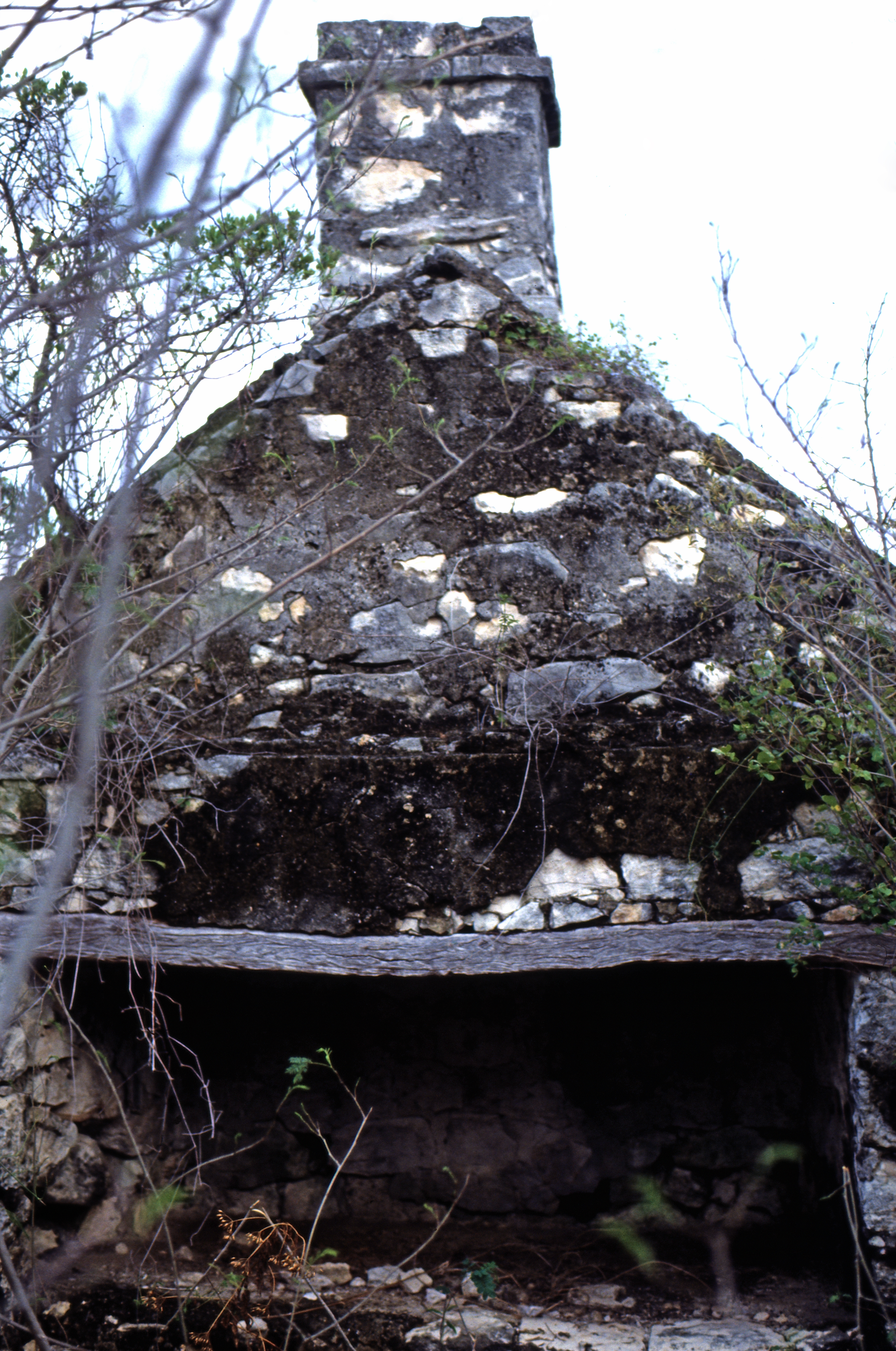 Ruine der Küche nahe des Haupthauses der Farquharson Plantation oder Fortune Hill an der Ostküste von San Salvador . Sie war größte und ist jetzt (2016) am besten erhaltene Plantagenruine aus der Zeit der Loyalisten und der Sklaverei.